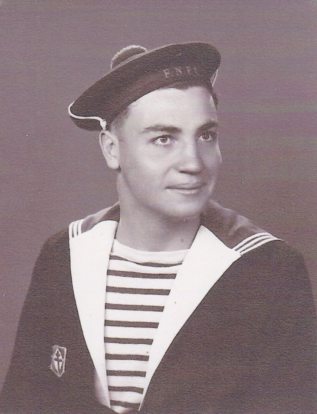 Michel Bacos , jeune engagé dans les FNFL